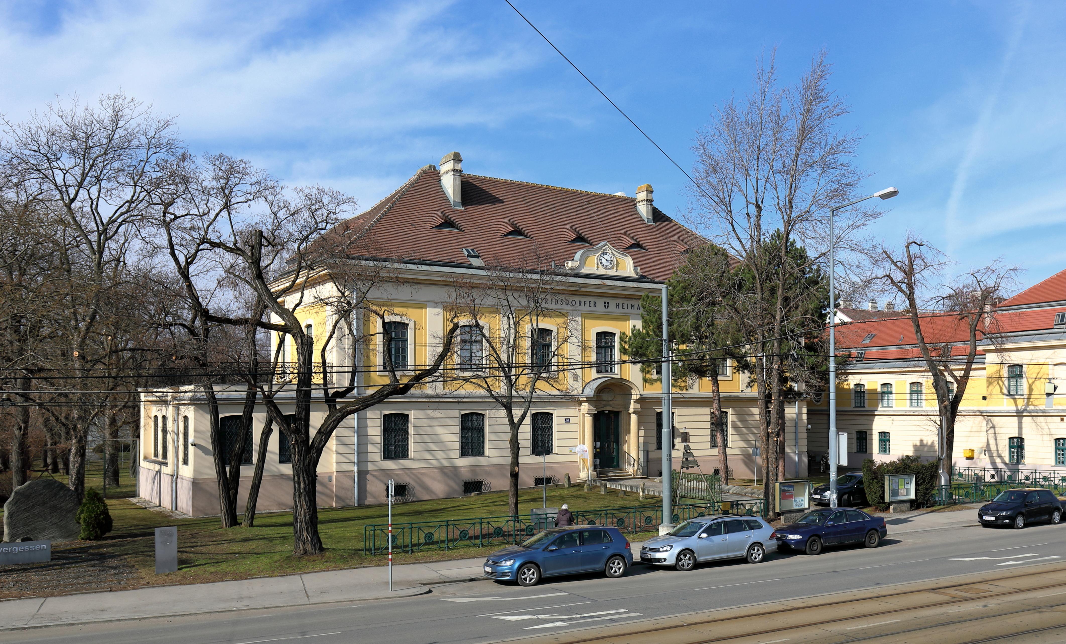 Das Mautner-Schlössl an der Adresse Prager Straße 33 im 21. Wiener Gemeindebezirk Floridsdorf, in dem aktuell (2018) das Floridsdorfer Heimatmuseum untergebracht ist.Das Schlössl ließ Georg Heinrich Mautner Markhof 1900/1901 mit secessionistischen Stilanklängen errichten und war ursprünglich flach gedeckt. 1909/1910 ließ sein Sohn Georg Anton Mautner Markhof es im barockem Sinn umgestalten. Nach dem Zweiten Weltkrieg kaufte die Gemeinde Wien das Schlössl, in das 1953 das Heimatmuseum Floridsdorf (Bezirksmuseum Floridsdorf) übersiedelte.